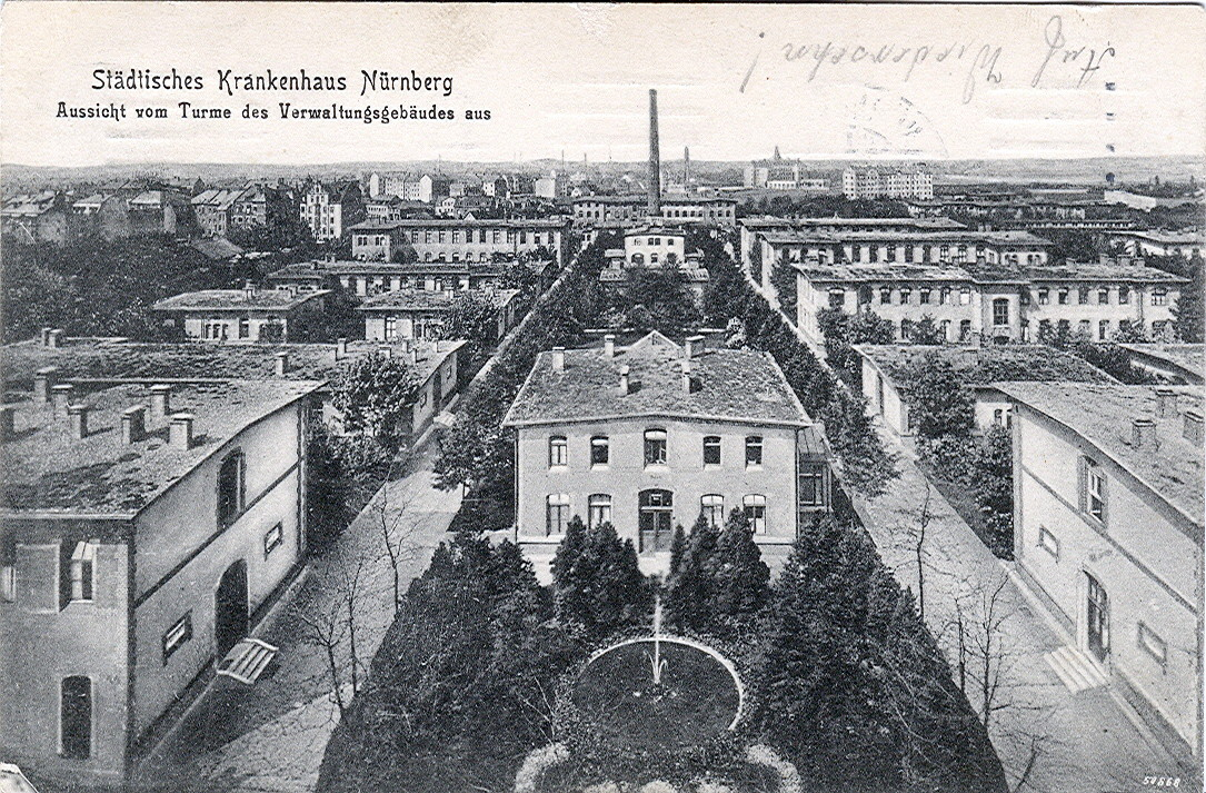 Postkarte, datiert 23.3.1916. Beschriftung: "Städtisches Krankenhaus Nürnberg - Aussicht vom Turm des Verwaltungsgebäudes aus."